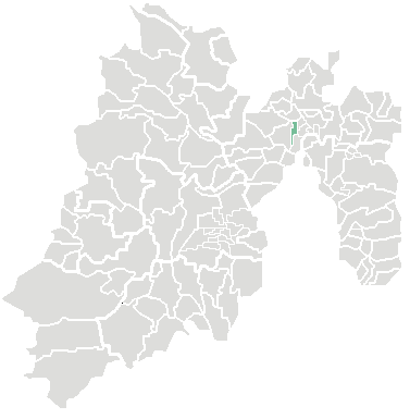 locatie van de gemeente Coacalco in Mexico (staat)